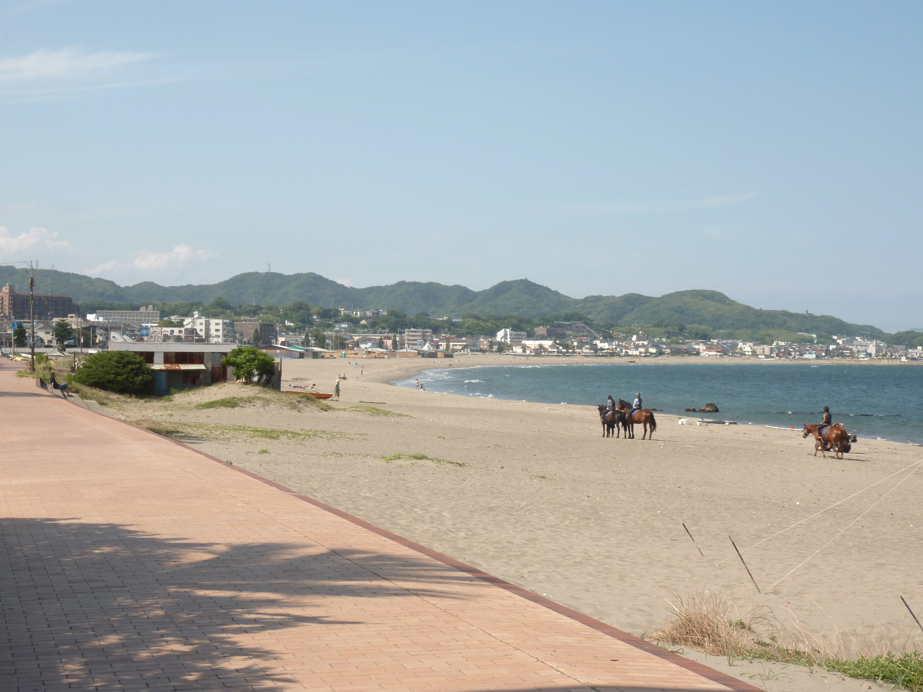 初夏の三浦海岸(神奈川県三浦市)